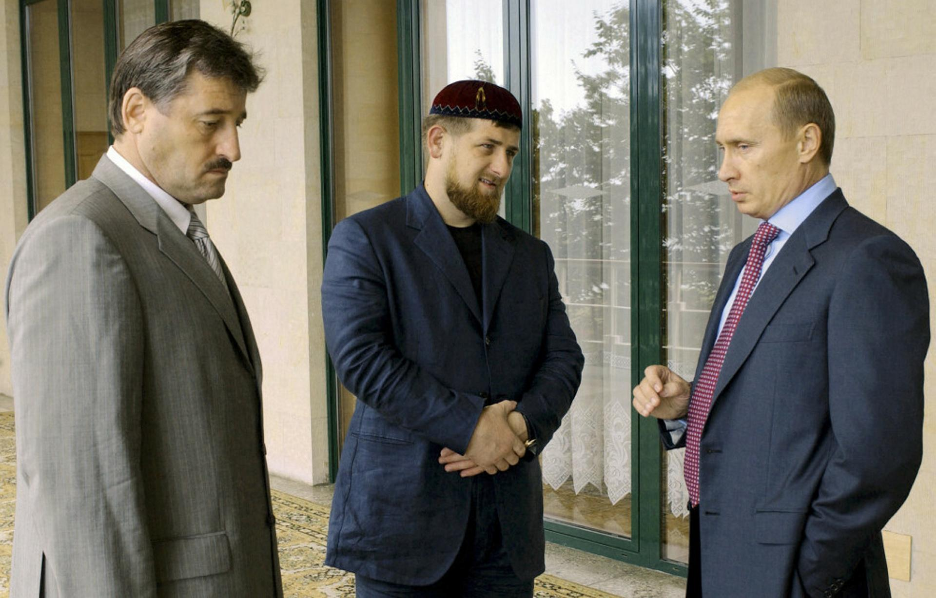 Владимир Путин с главой Общественного совета по контролю за восстановлением экономики и социальной сферы Чеченской Республики Алу Алхановым и первым заместителем председателя правительства Чеченской Республики Рамзаном Кадыровым